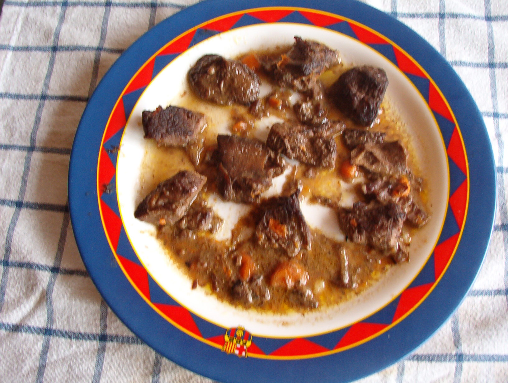 Imatge d'un plat de carn estofada